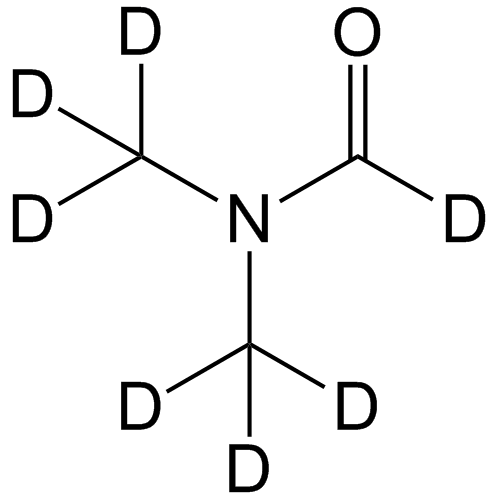 Gedeutereerd dimethylformamide